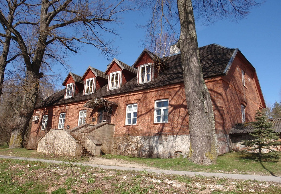 Koiola vallamaja